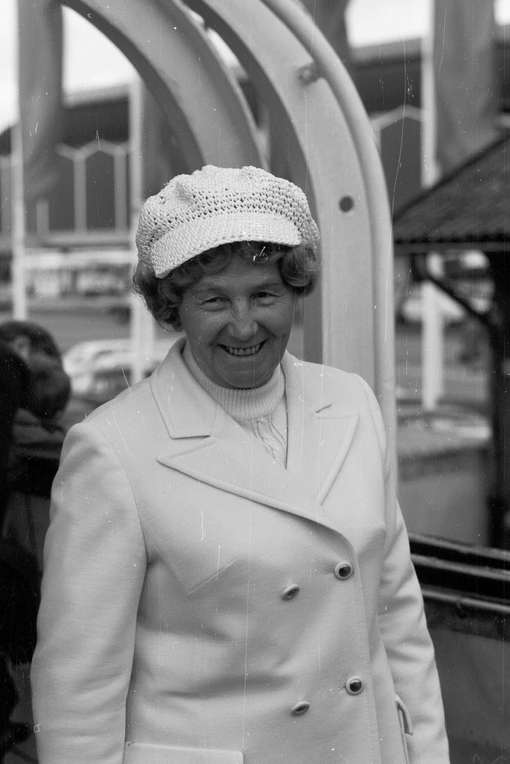 Die Gastgeberin der Regattabegleitfahrt zur Kieler Woche 1972 für Gäste der Stadt auf der TOM KYLE.